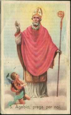 Sant'Agabio di Novara